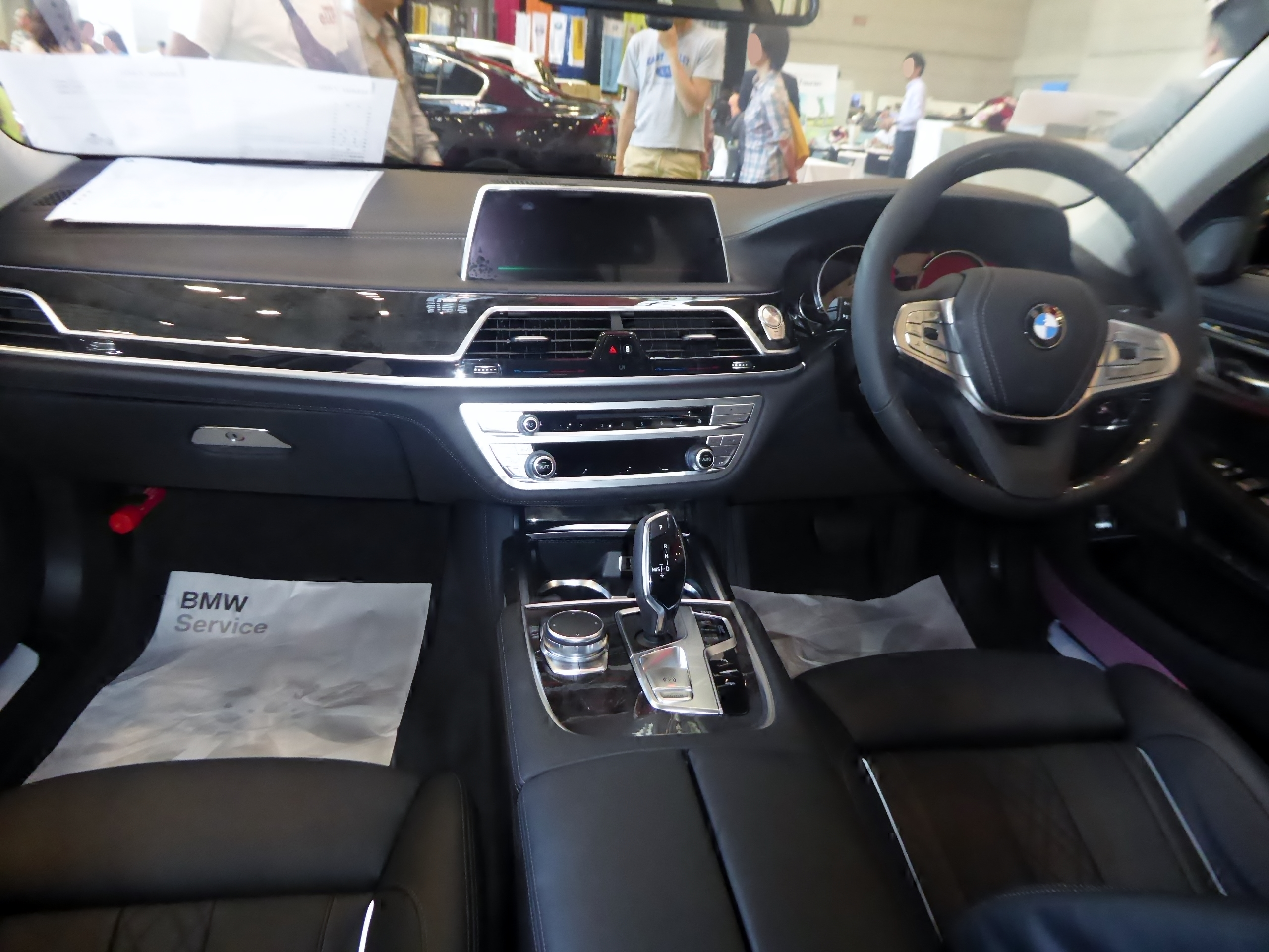 G11系BMW・740iのインテリアを撮影。